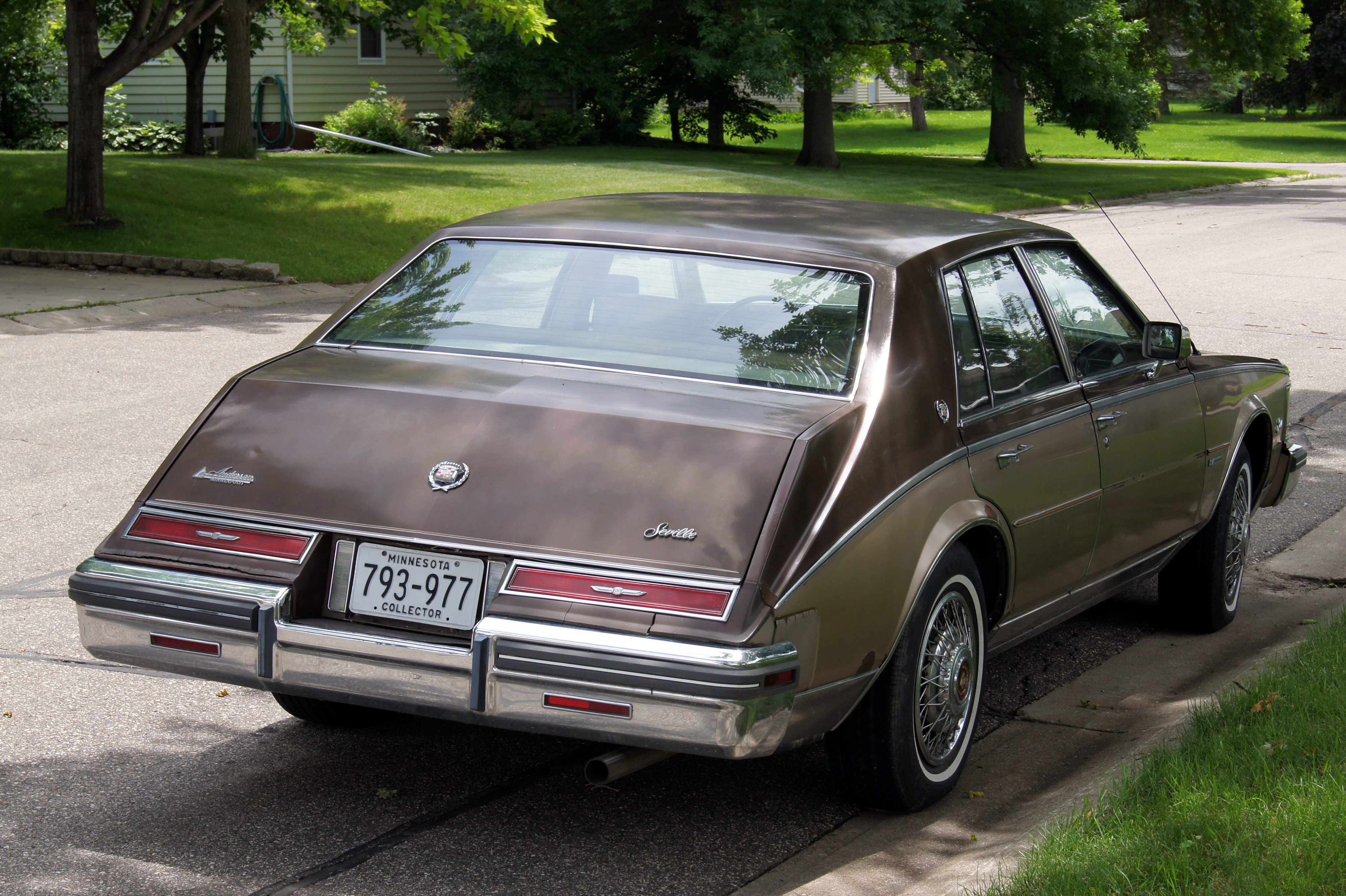 V8-6-4 More Car Pictures